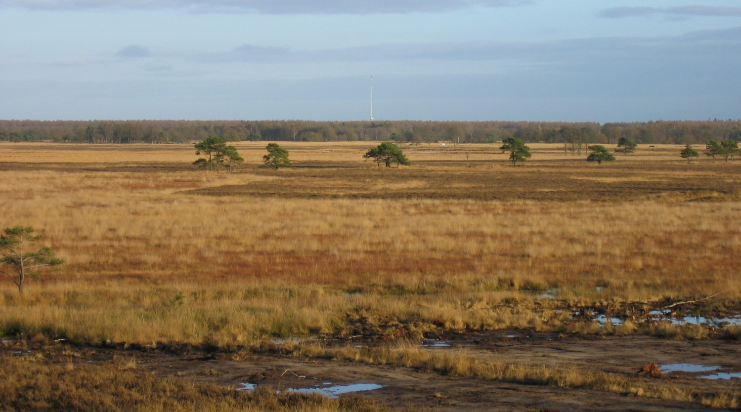 Eigen foto van Doldersummerveld (nov 2004) vanaf de uitzichttoren, onderdeel van Nationaalpark Drents Friese Wold. In het midden is de zendmast van Smilde te herkennen.